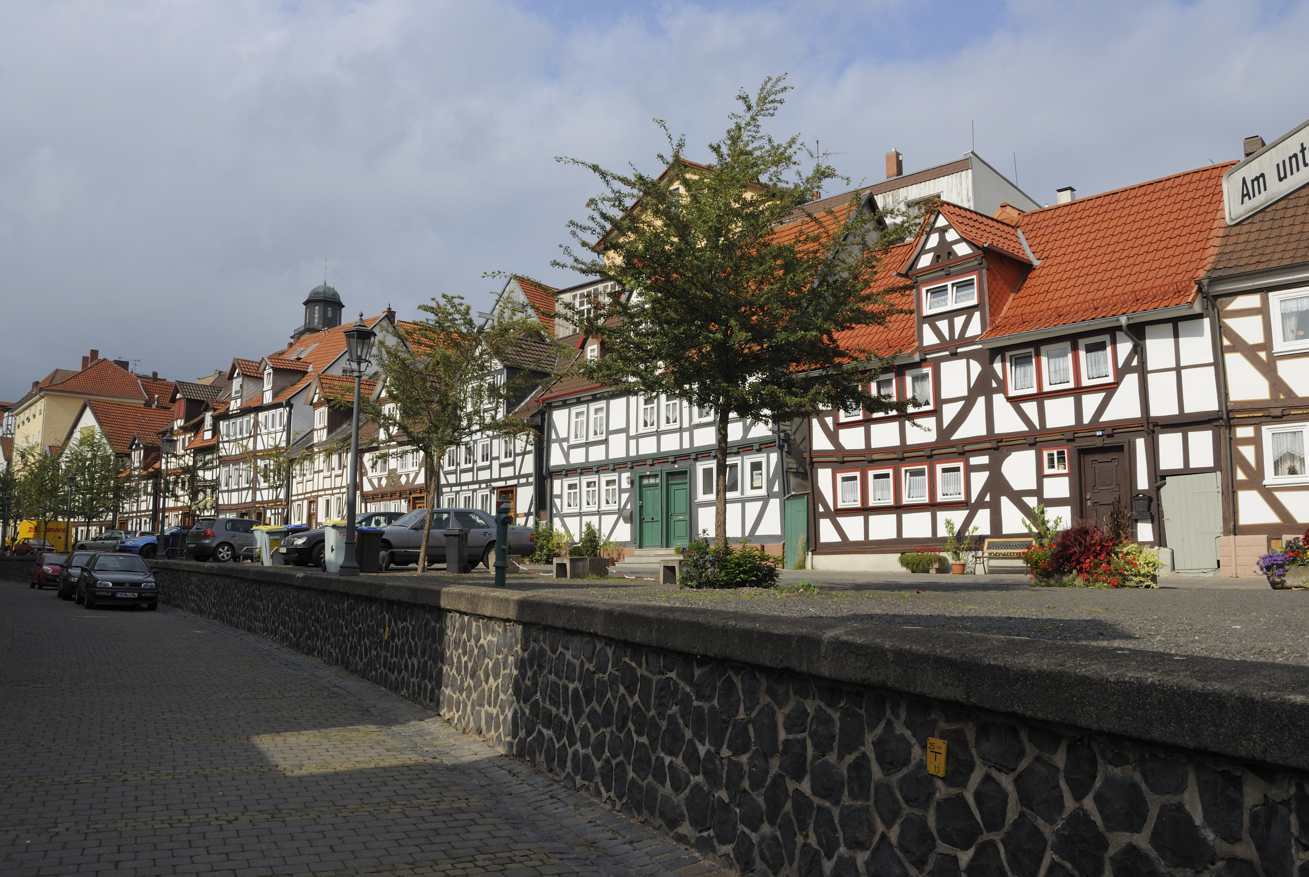 Dieses Foto entstand im Rahmen des Projekts Wiki Loves Monuments Mittelhessen, das aus dem Community-Projektbudget von Wikimedia Deutschland e. V. gefördert wurde.